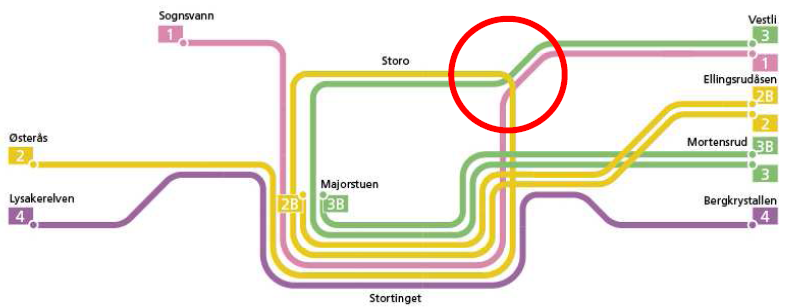 Mulige fremtidige t-bane-ruter i Oslo. Fra foilen til samferdselsbyråd i Oslo, Peter Myhre. / Possible future subway-lines in Oslo, Norway.